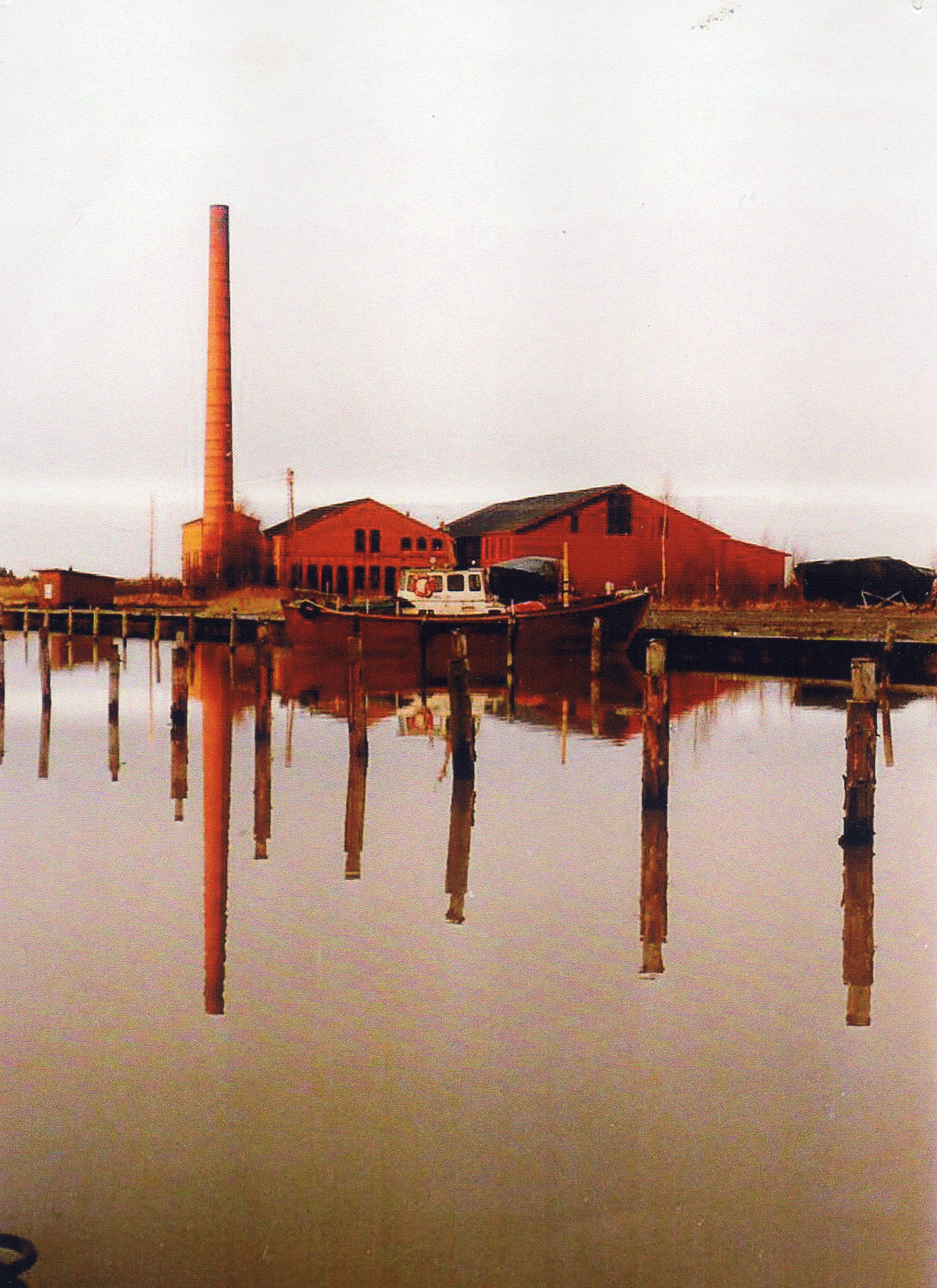 Reposaaren saha